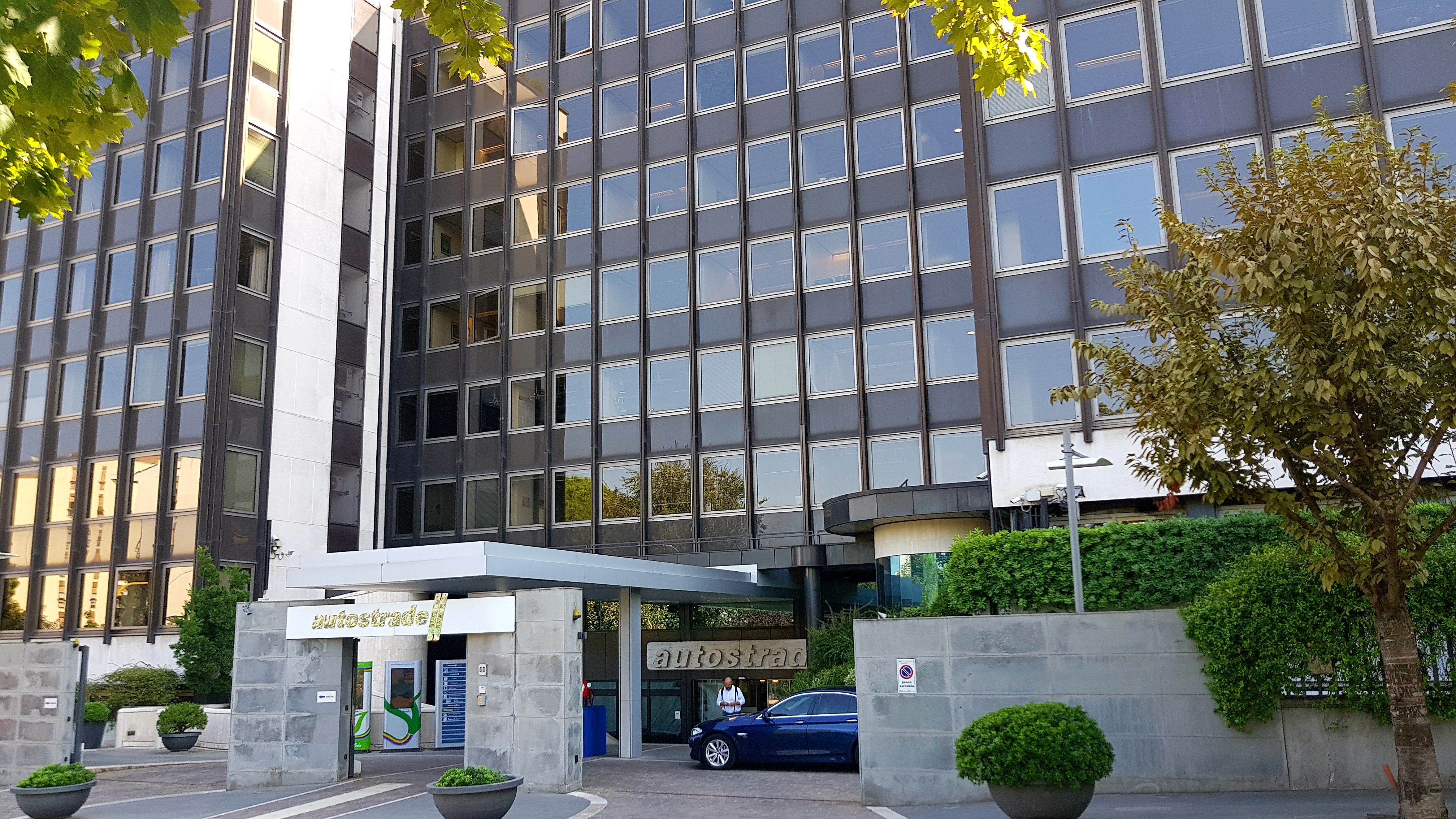 Sede di Autostrade per l’Italia SpA a Roma